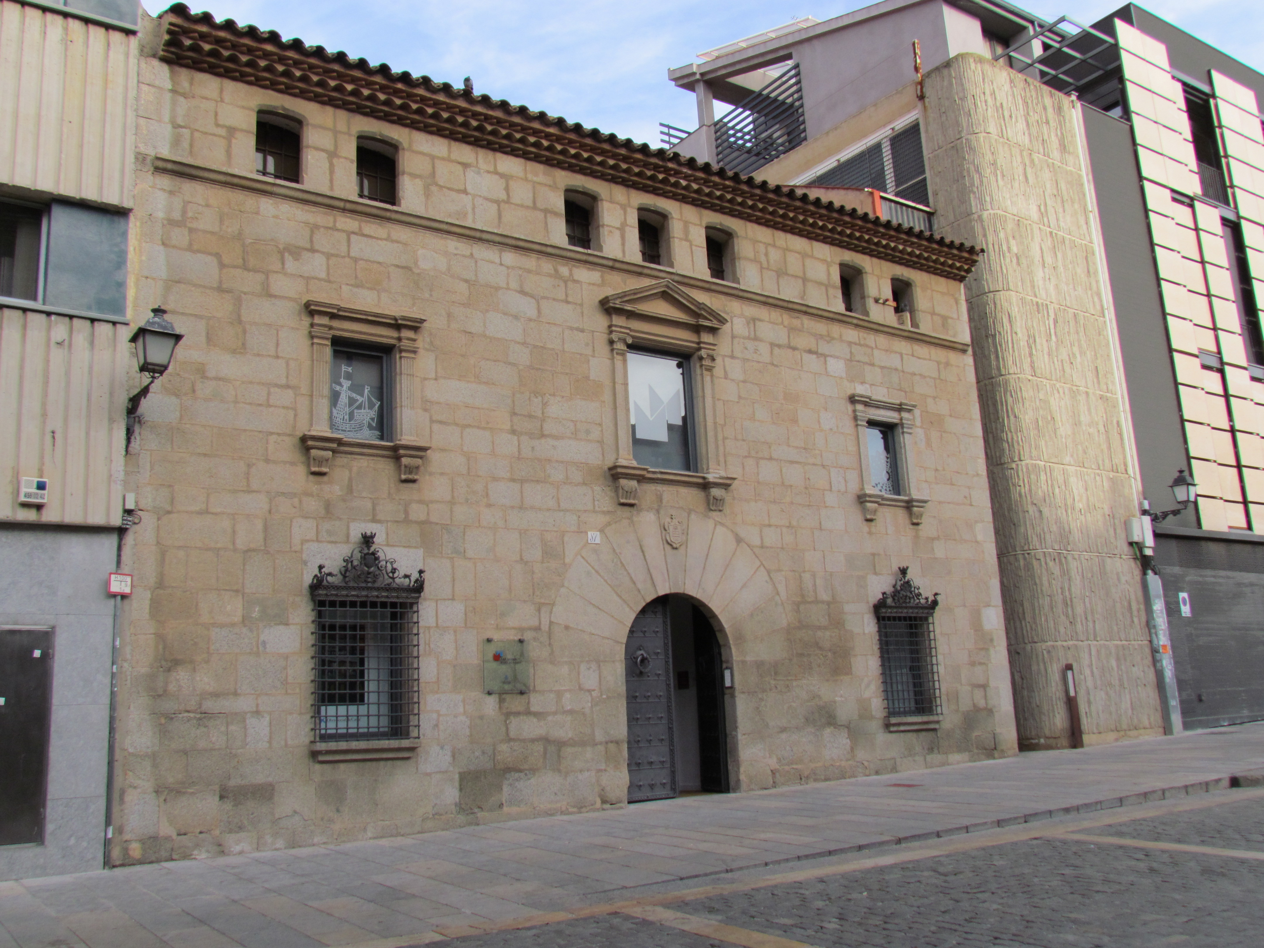 Vista de la Façana de Can Serra. (Mataró, el Maresme).